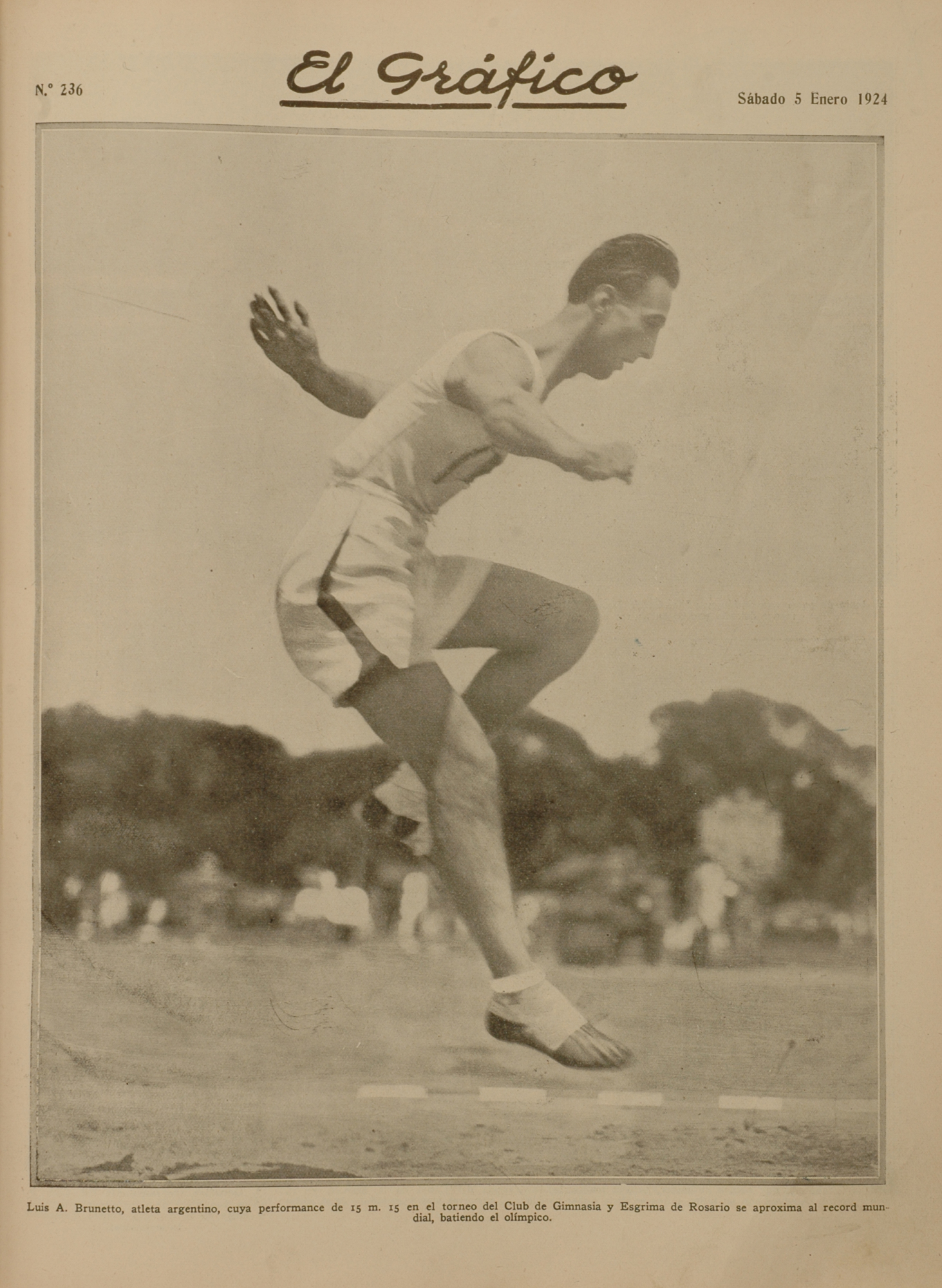 El Grafico del 05 de Enero de 1924. Edicion 236